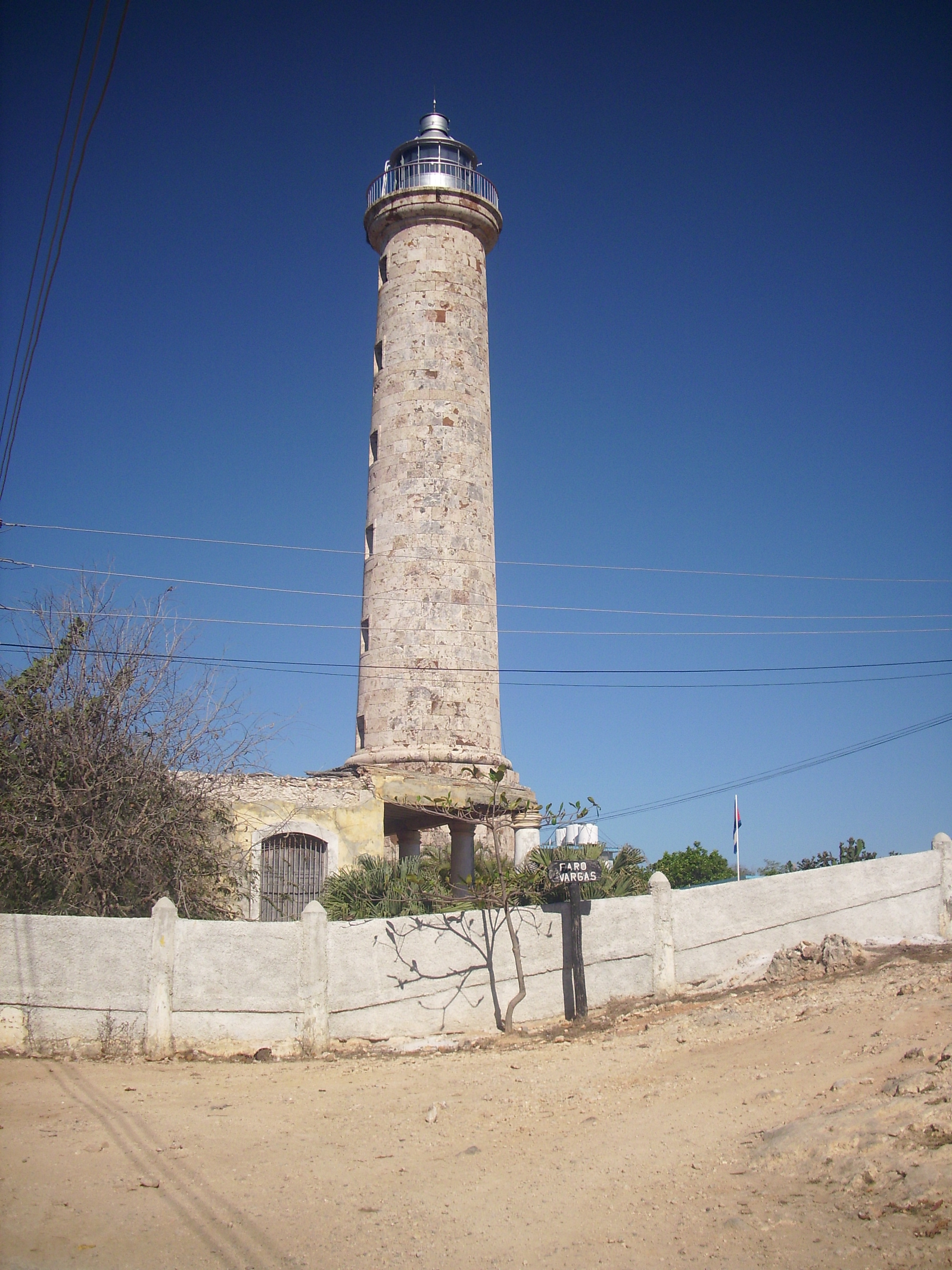 Faro Vargas, Cabo Cruz